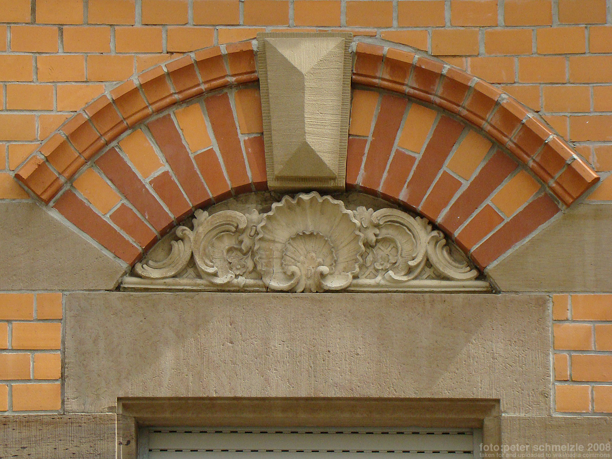 Denkmalgeschützte Gebäude Querstr. 9 in Heilbronn-Böckingen, Detail